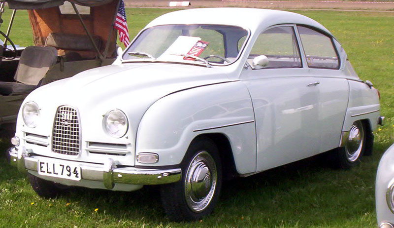 SAAB 96 De Luxe 2-Door Sedan 1964